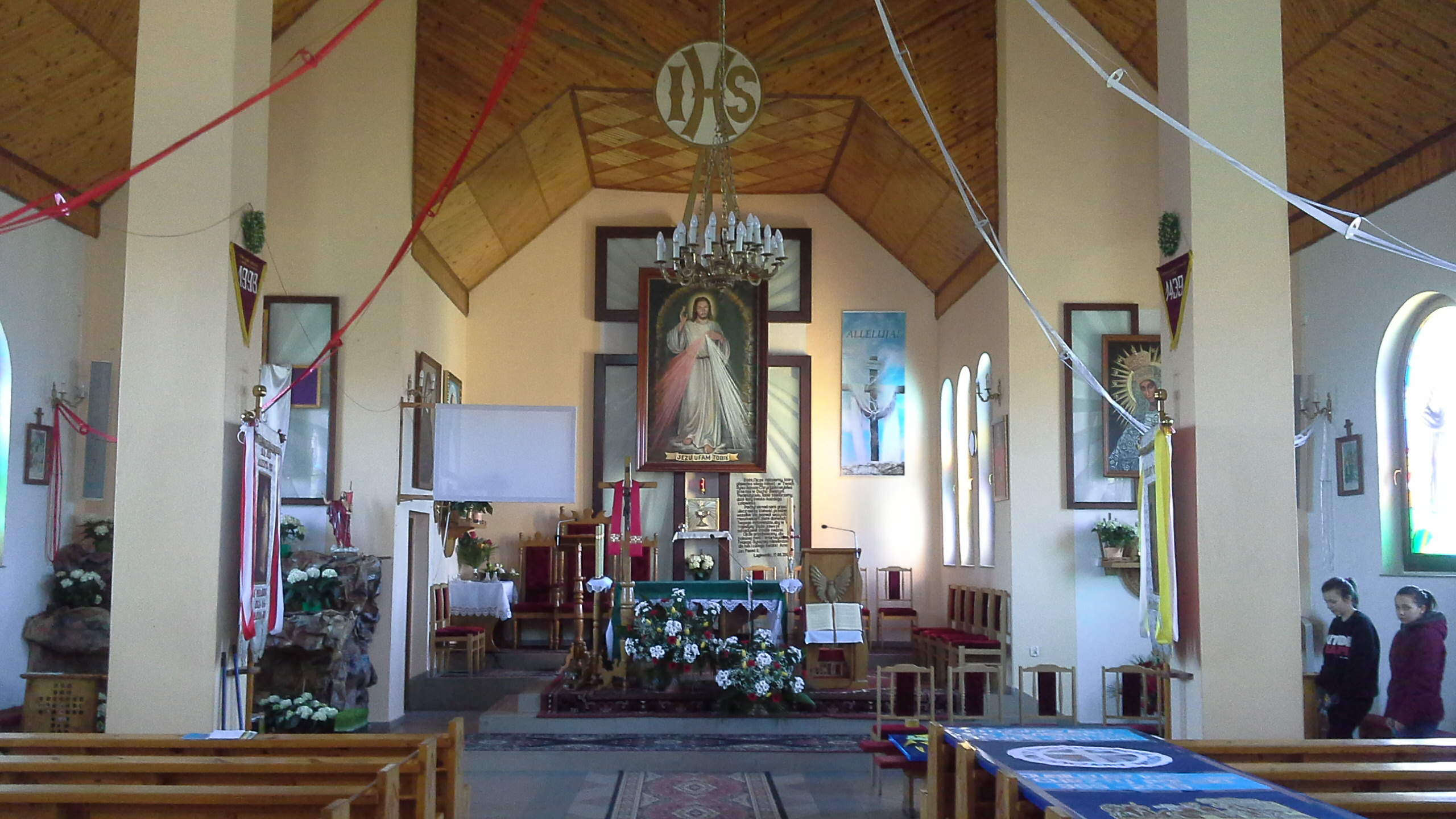 Wnętrze kościoła w Gozdowie